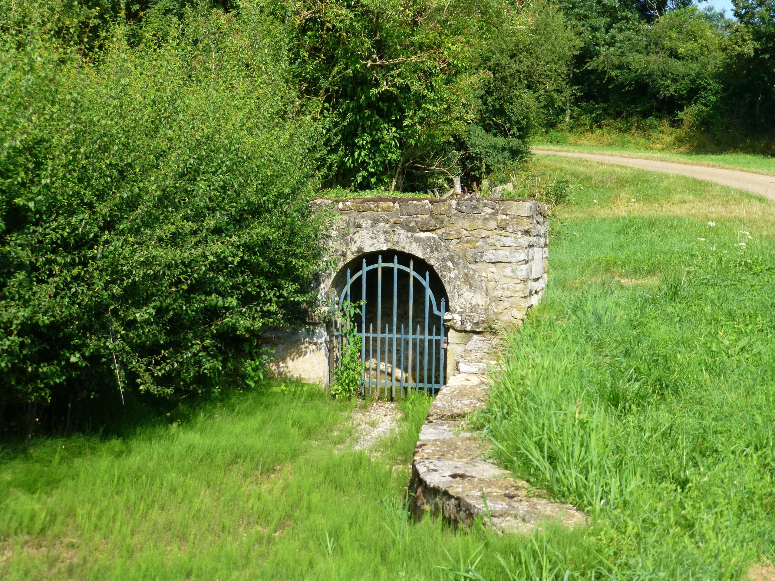 Source de la Guye à Sainte-Hélène (71), la fontaine.